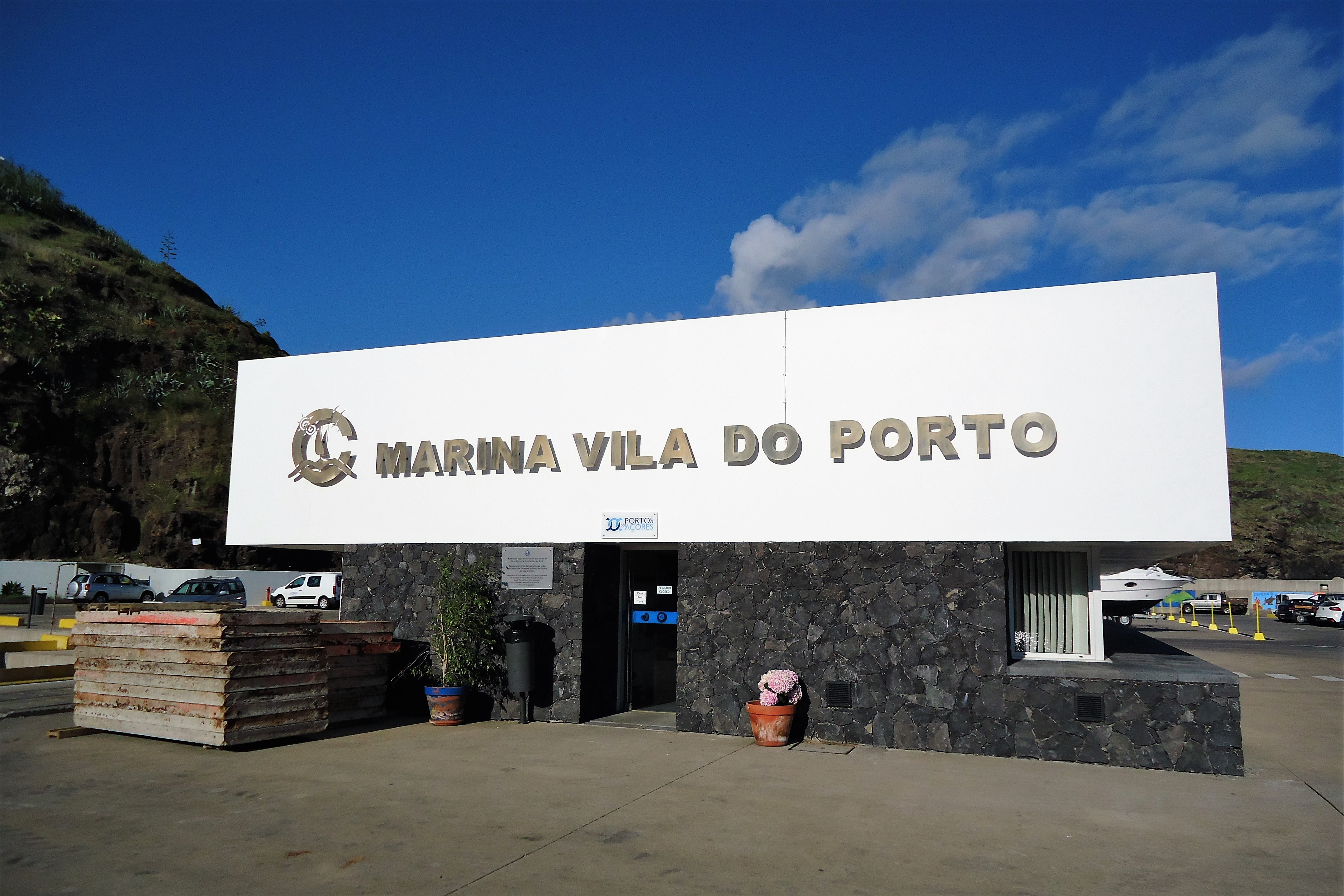 Marina de Vila do Porto, ilha de Santa Maria, Região Autónoma dos Açores, Portugal.